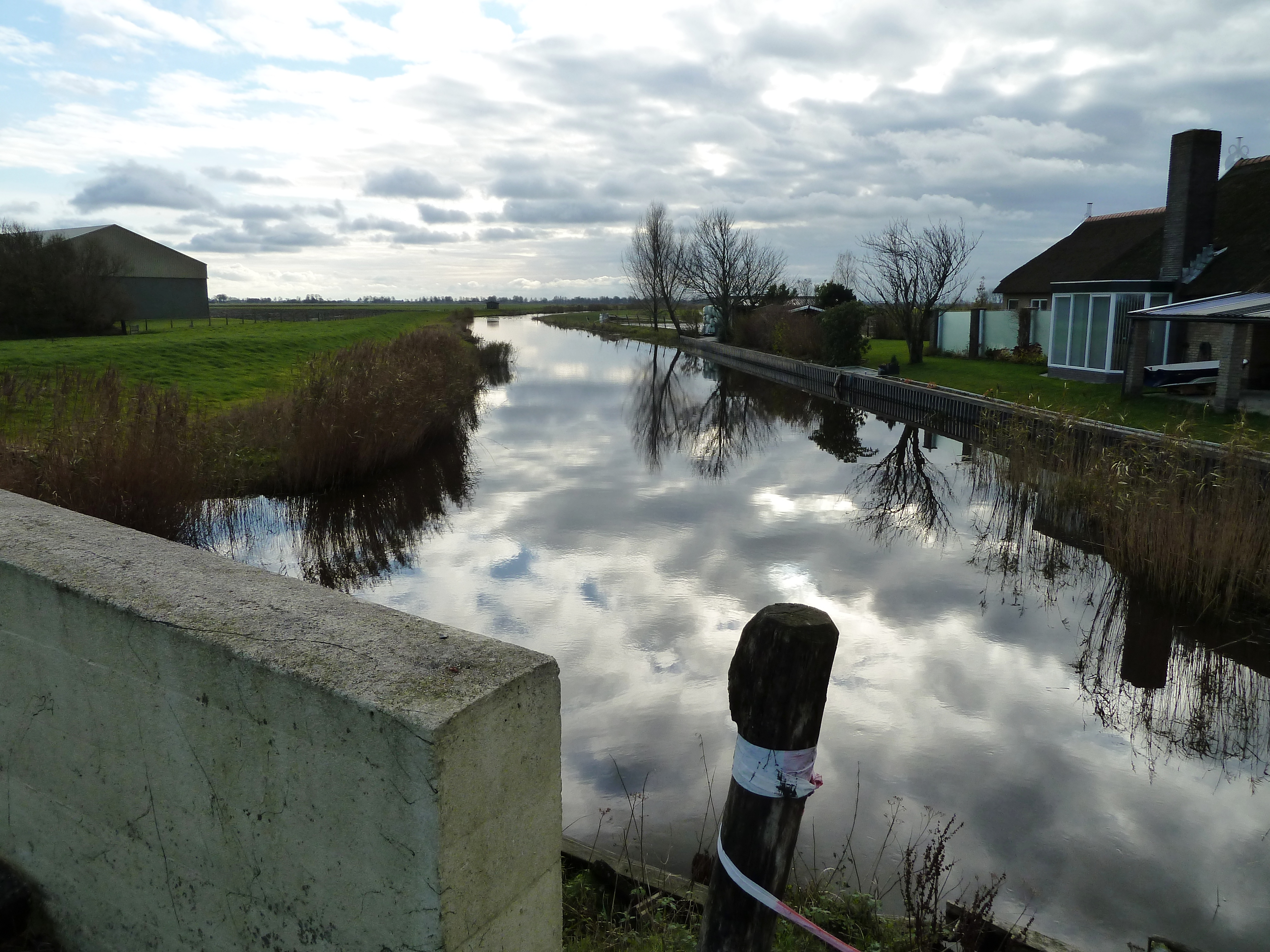 De Oude Lauwers nabij het buurtschap De Leegte, gezien in de richting van het zuiden.